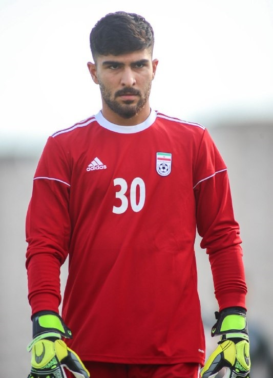 امیر عابدزاده در تمرینات تیم فوتبال ایران